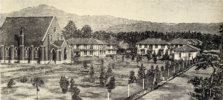 1886年の同志社のキャンパス